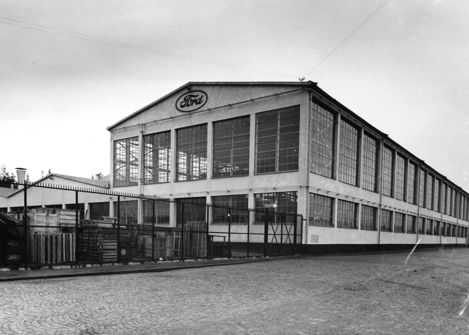 Stockholms Frihamn: Ford Motor company´s komplex i Frihamnen